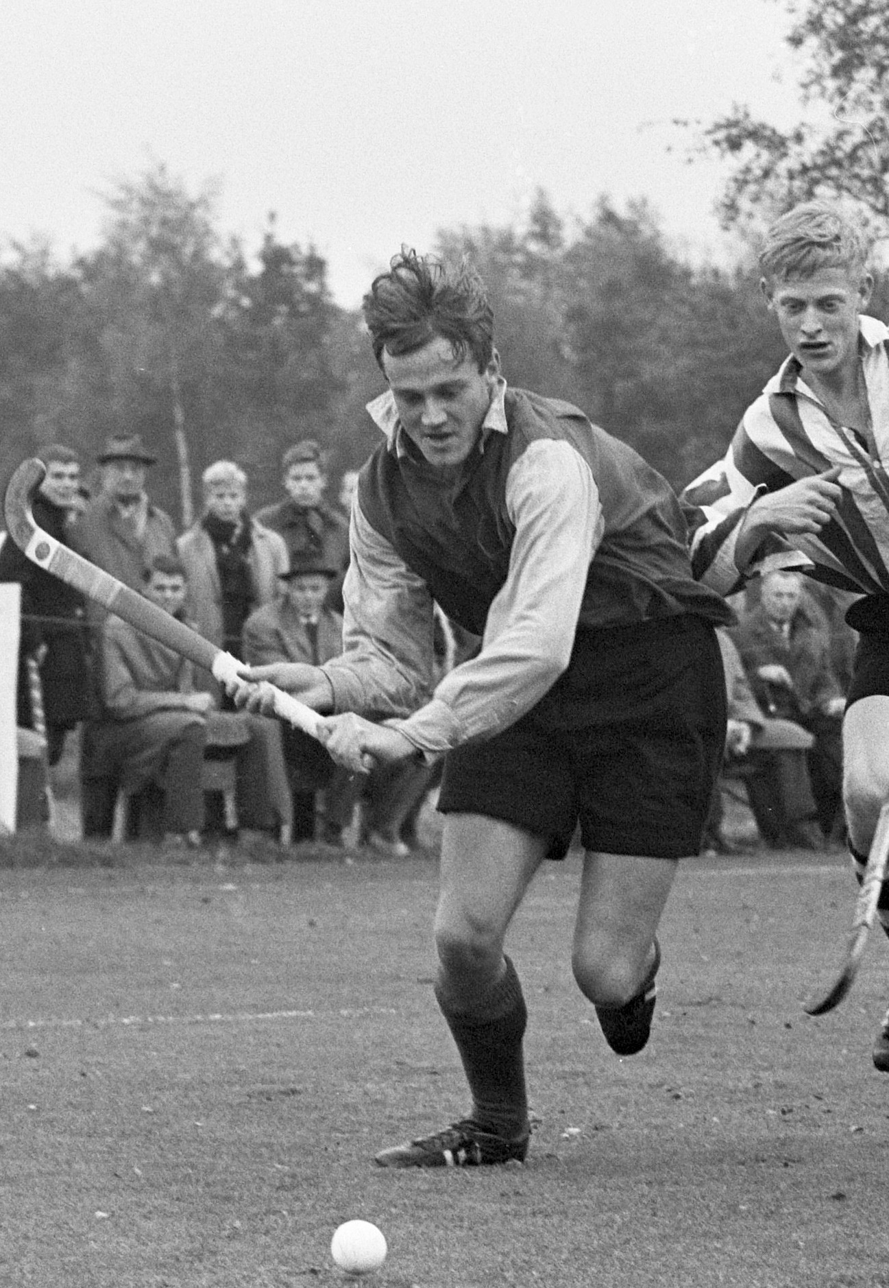 Hockey SCHC tegen HDM 2-1. Frank Zweerts maakt eerste doelpunt voor SCHC